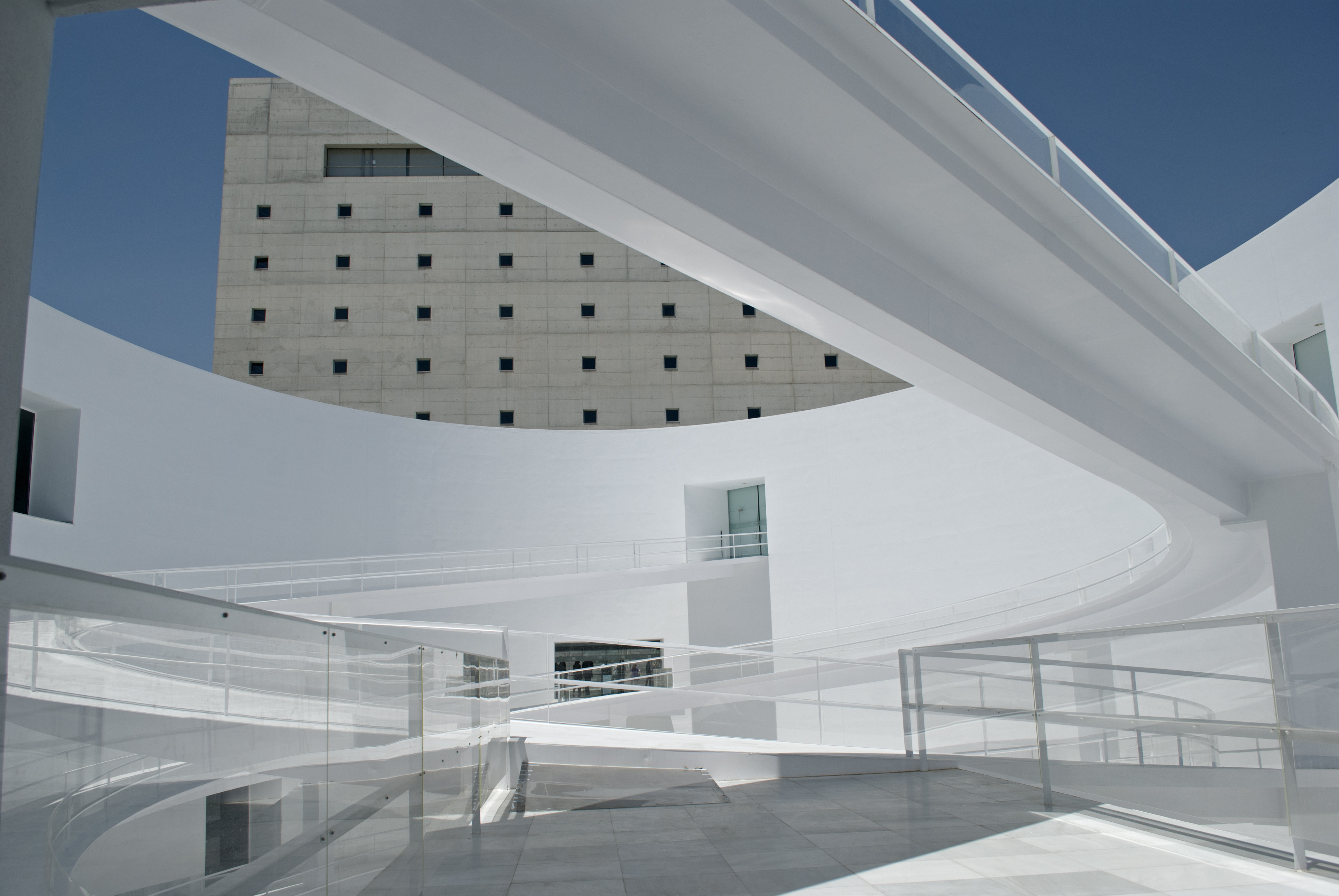 Patio del Museo de Memoria de Andalucía. Arquitecto Alberto Campo Baeza